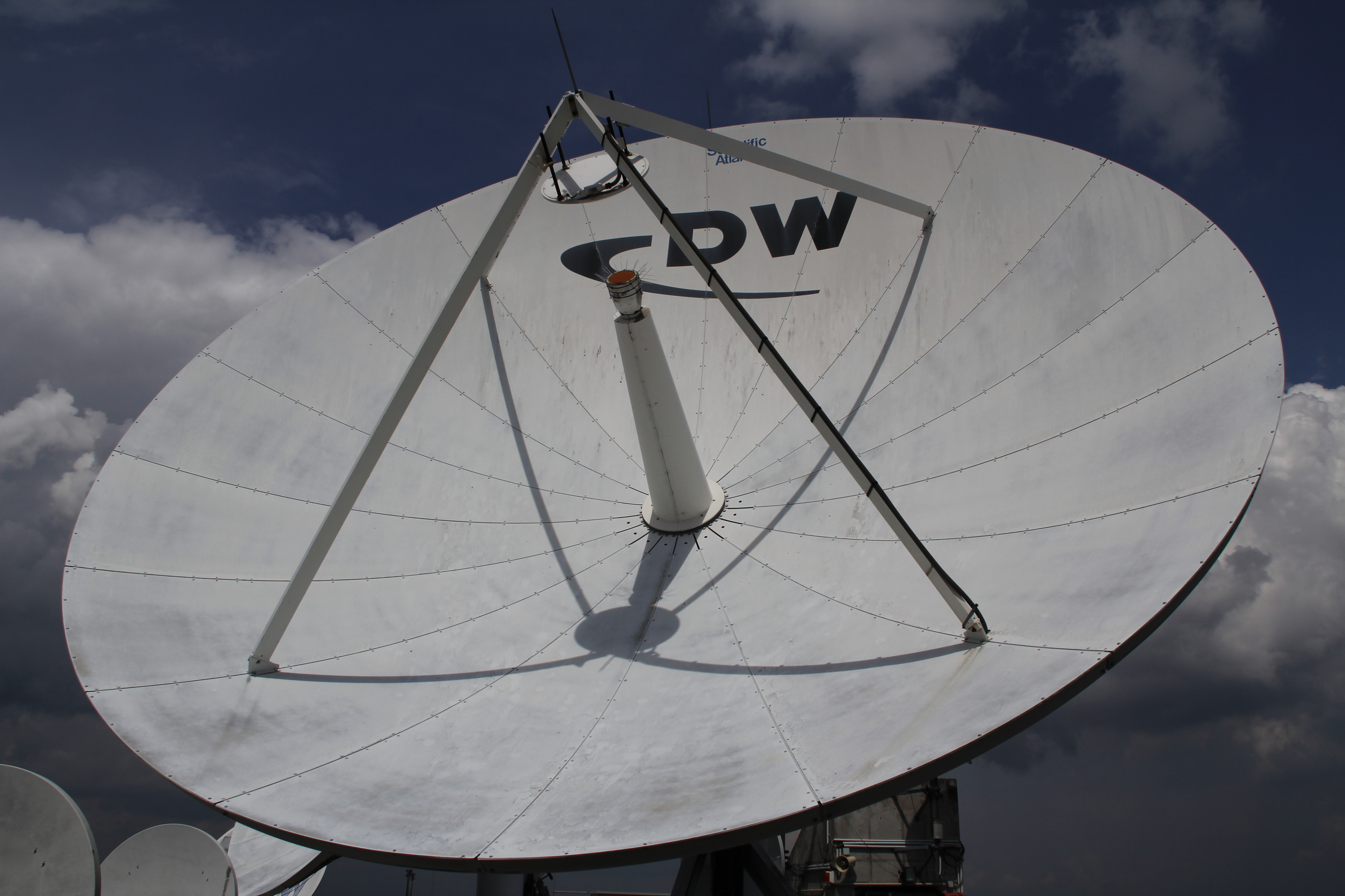 Auf dem Dach des Deutschen Welle Studios in Berlin